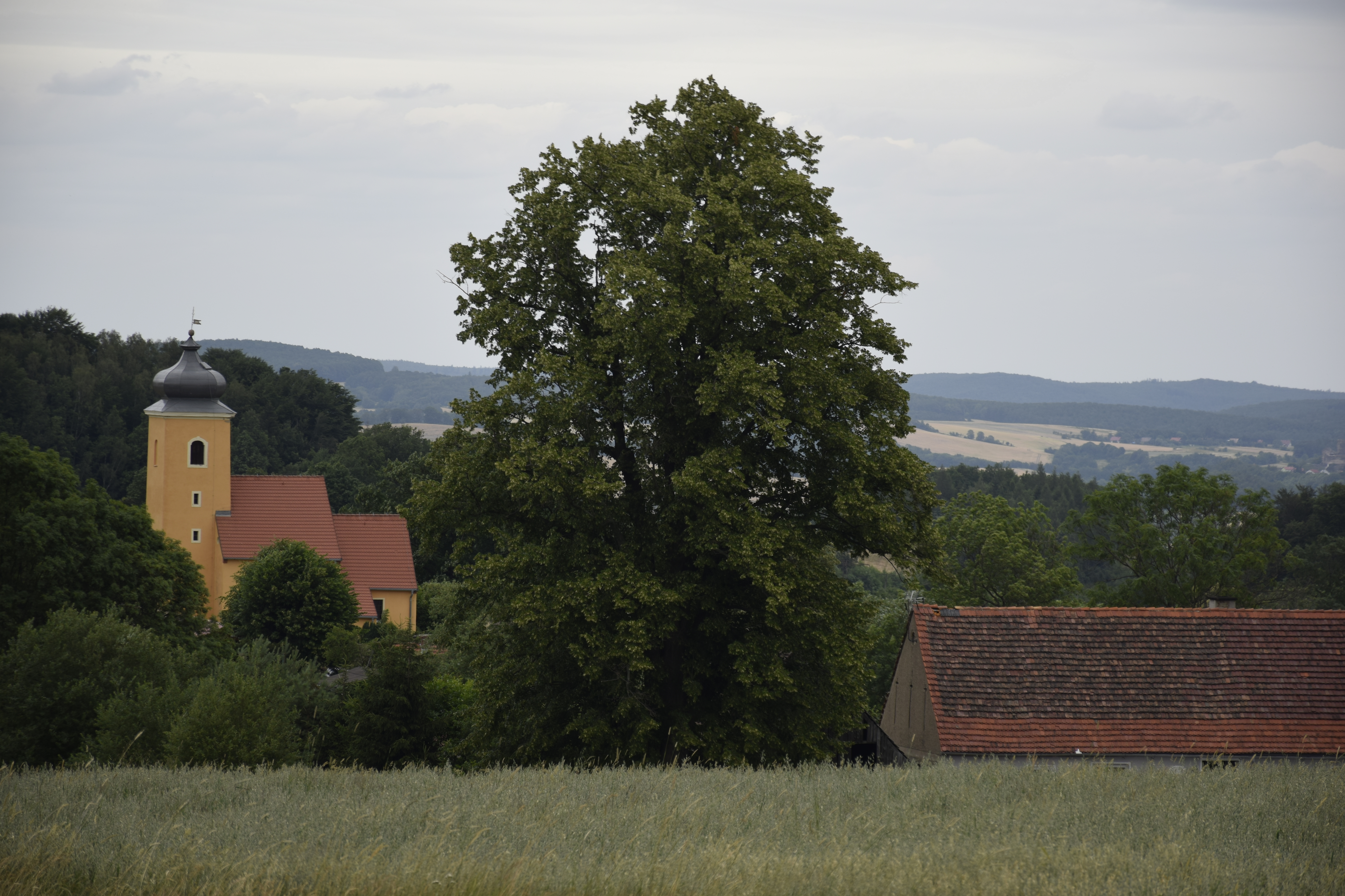 Domanów. Polska